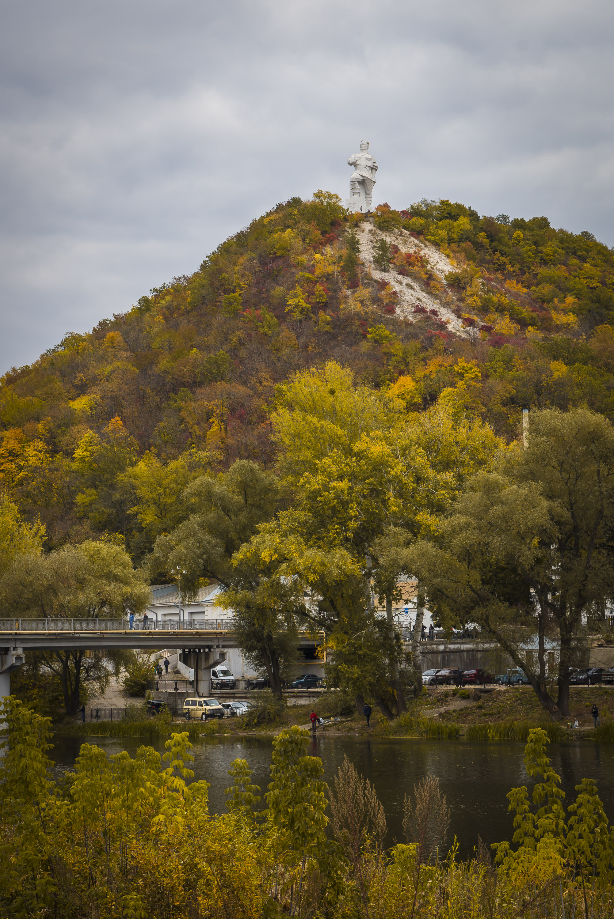 Пам'ятник радянському партійному і державному діячеві Артему (Ф. А. Сергеєву), Святогірськ, гора Артема